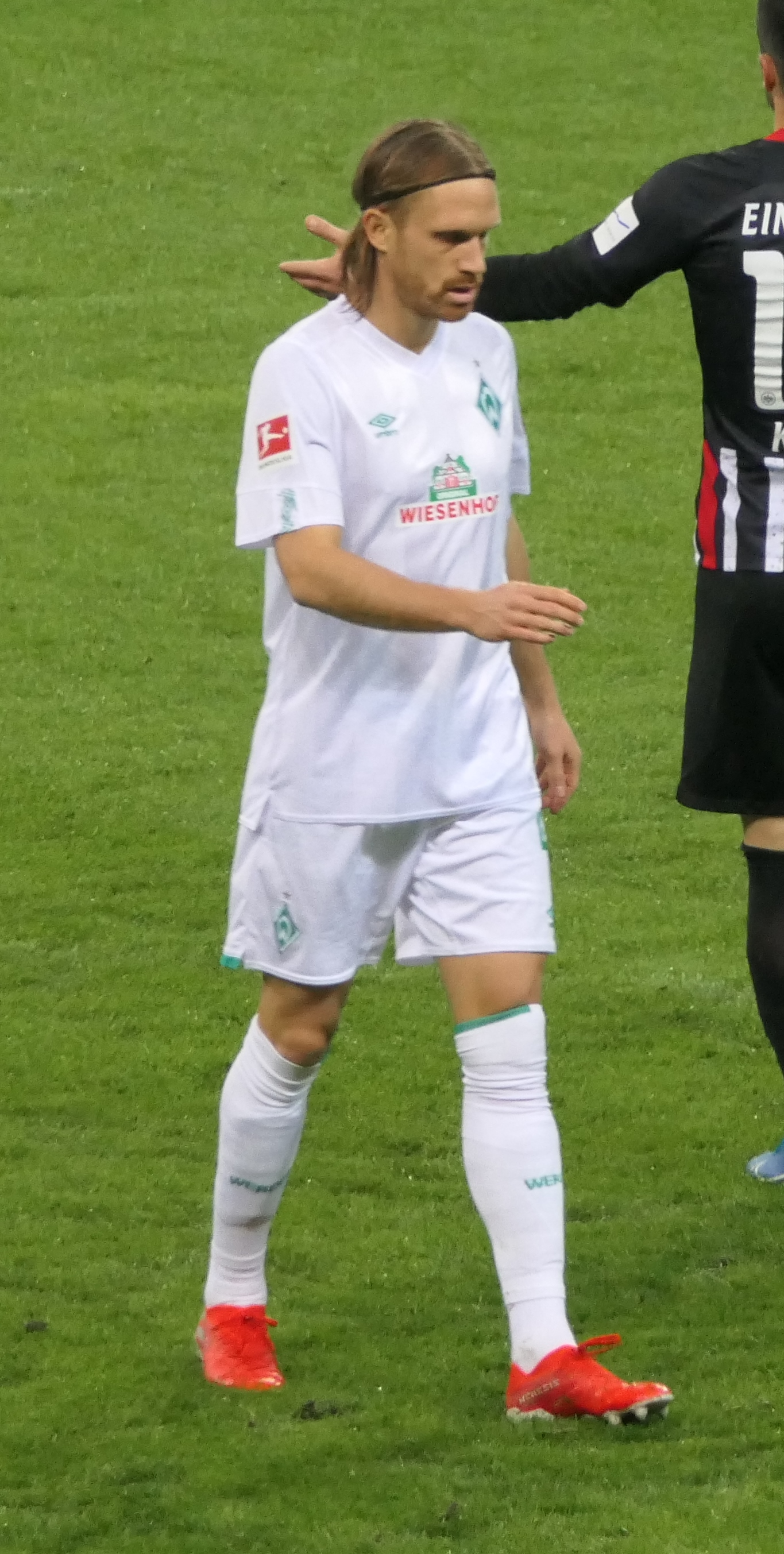 Der Fussballprofi Michael Lang im Trikot vom SV Werder Bremen beim Auswärtsspiel gegen Eintracht Frankfurt am 06.10.2019.